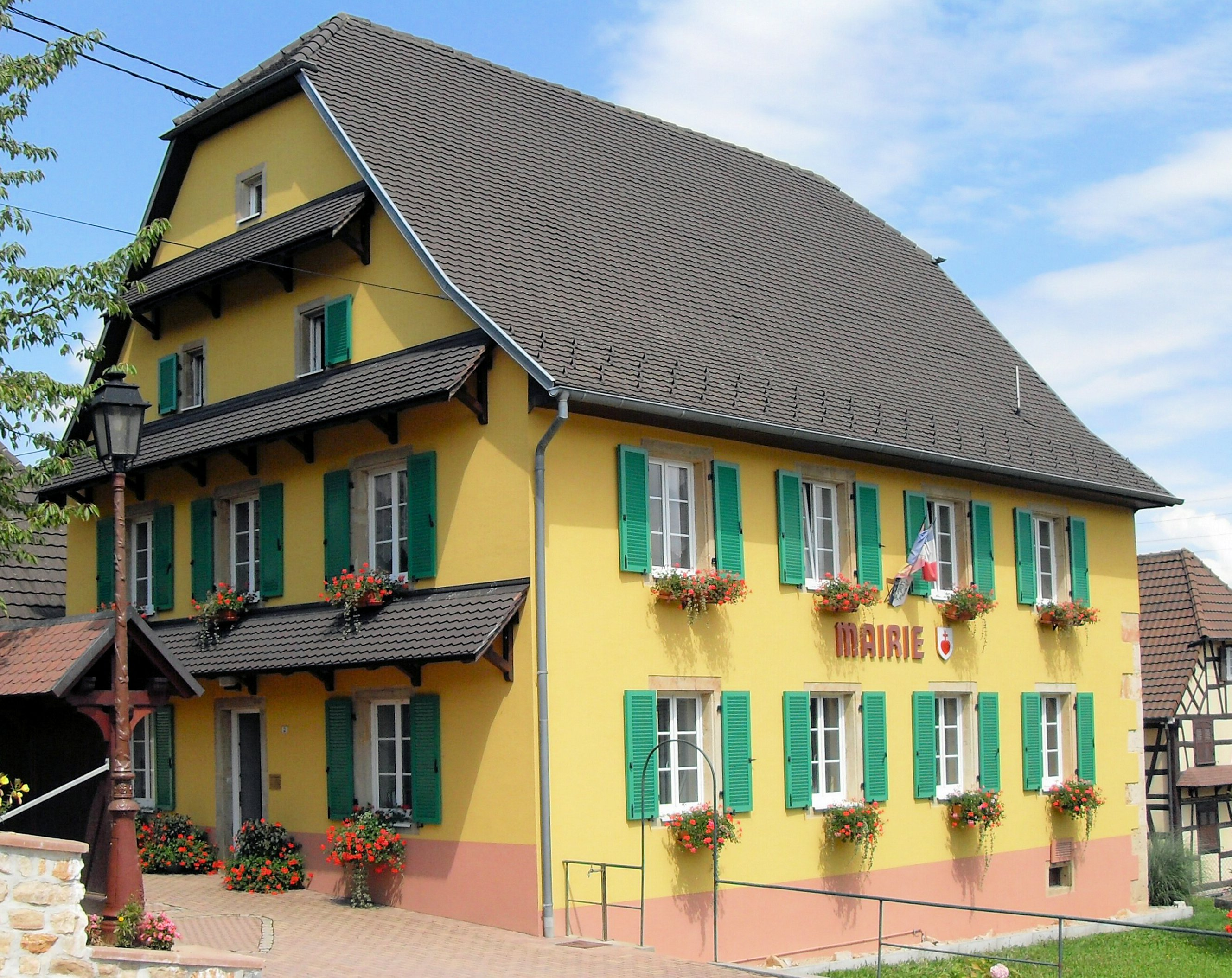 La mairie de Riespach